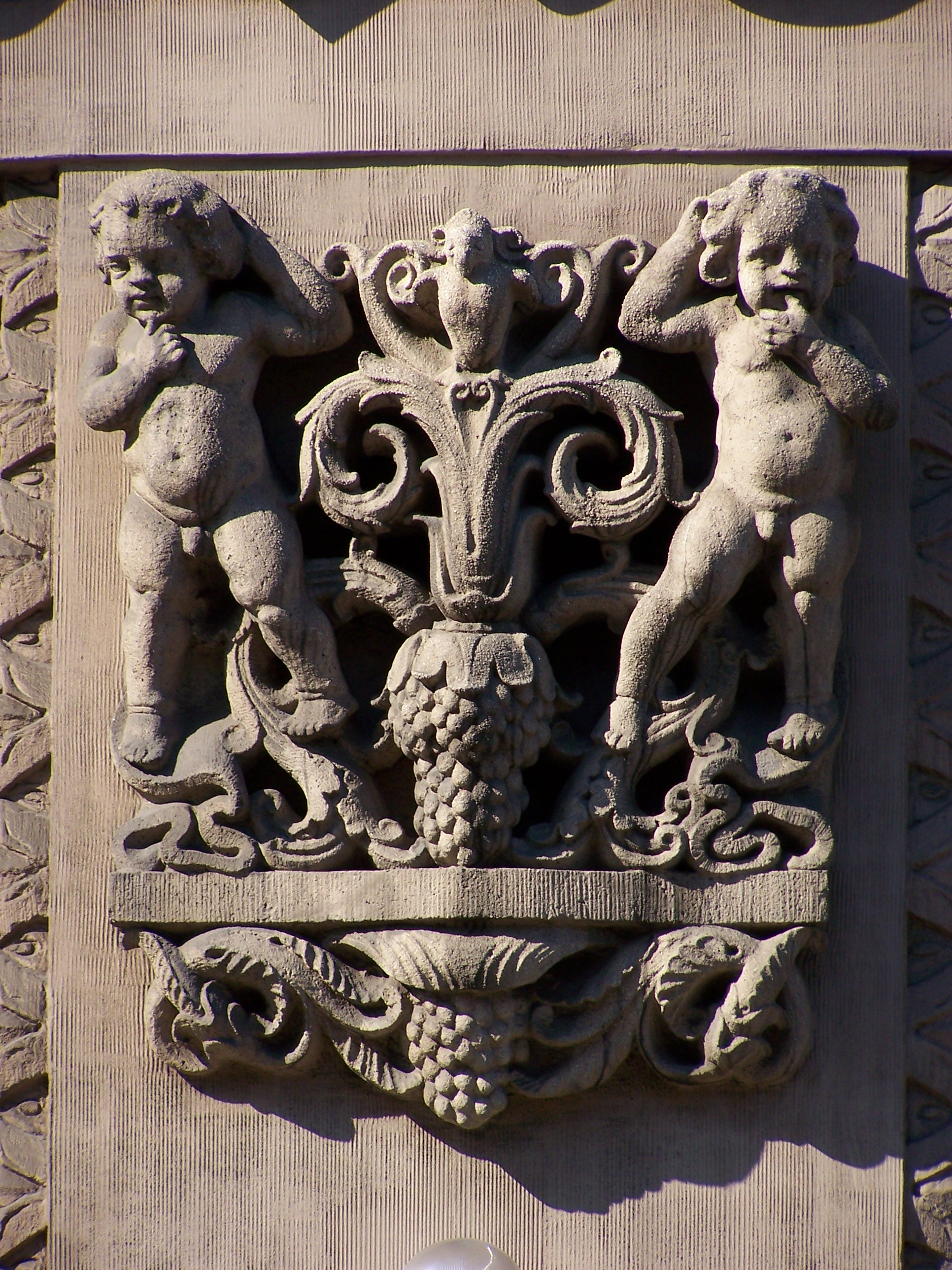 Detal architektoniczny kamienicy przy ul. Mickiewicza 8 w Katowicach (zabytek nr rejestr. A/1316/83)